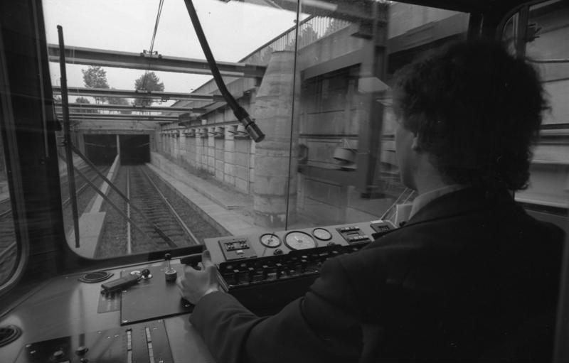 Öffentlicher Dienst